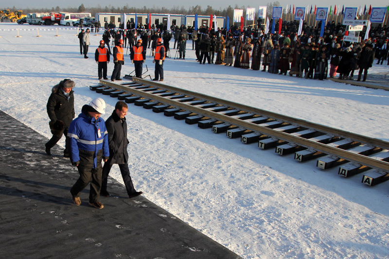 Дмитрий Медведев на укладке золотого звена в Нижнем Бестяхе